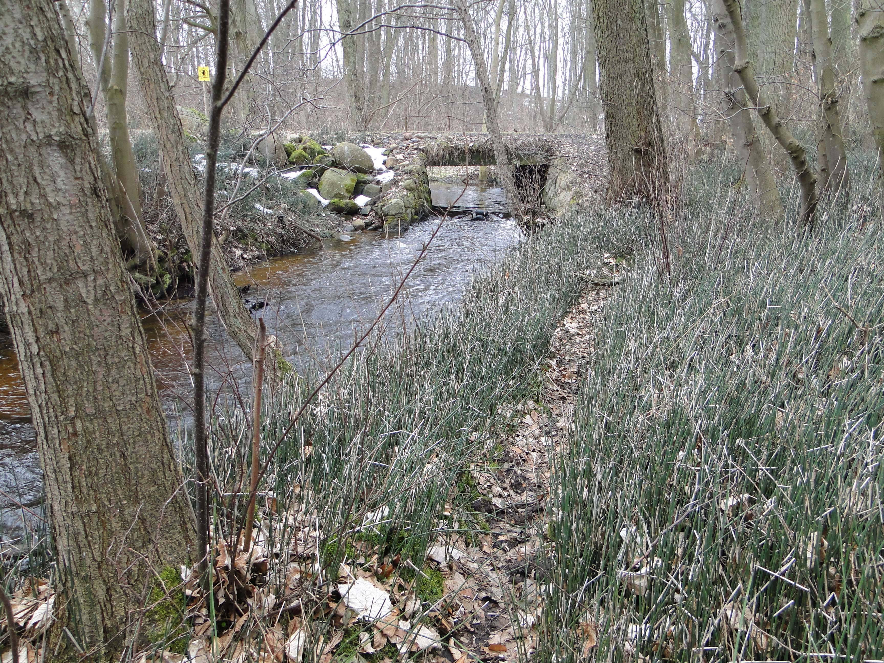 Blick in das Naturschutzgebiet Reppeliner Bachtal, Mecklenburg-Vorpommern. - OpenStreetMap(Info)